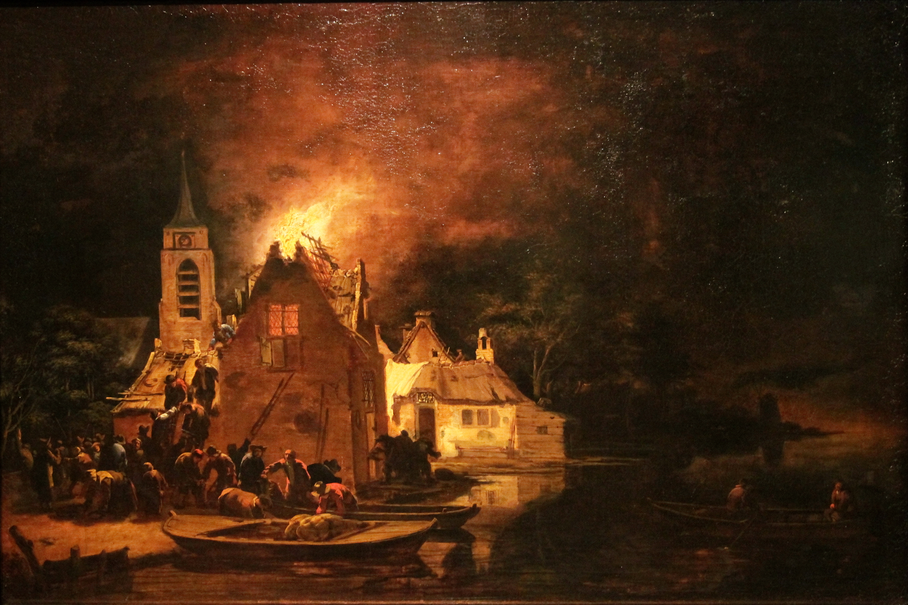 Presque totalité de l’œuvre visible dans le cadre.